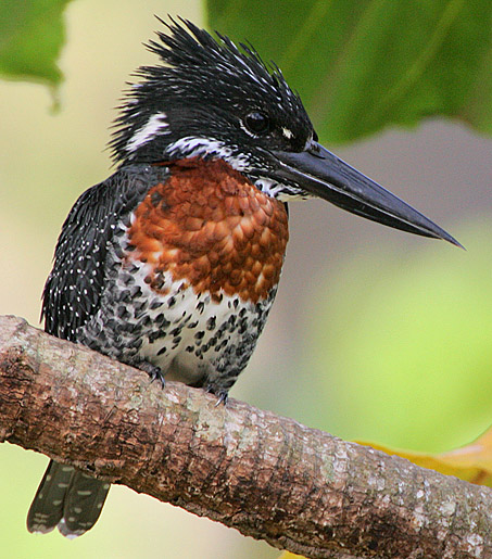 Image taken at Abuko, The Gambia